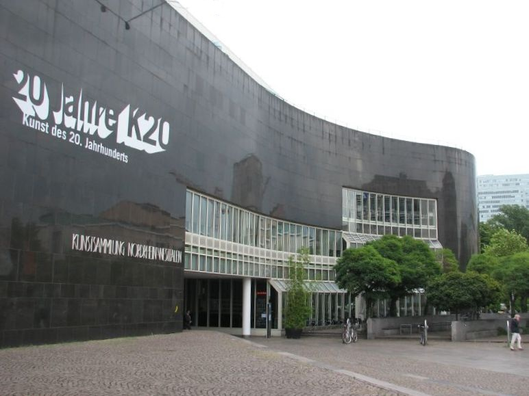 Kunstsammlung Nordrhein-Westfalen (K20) in Düsseldorf/Germany